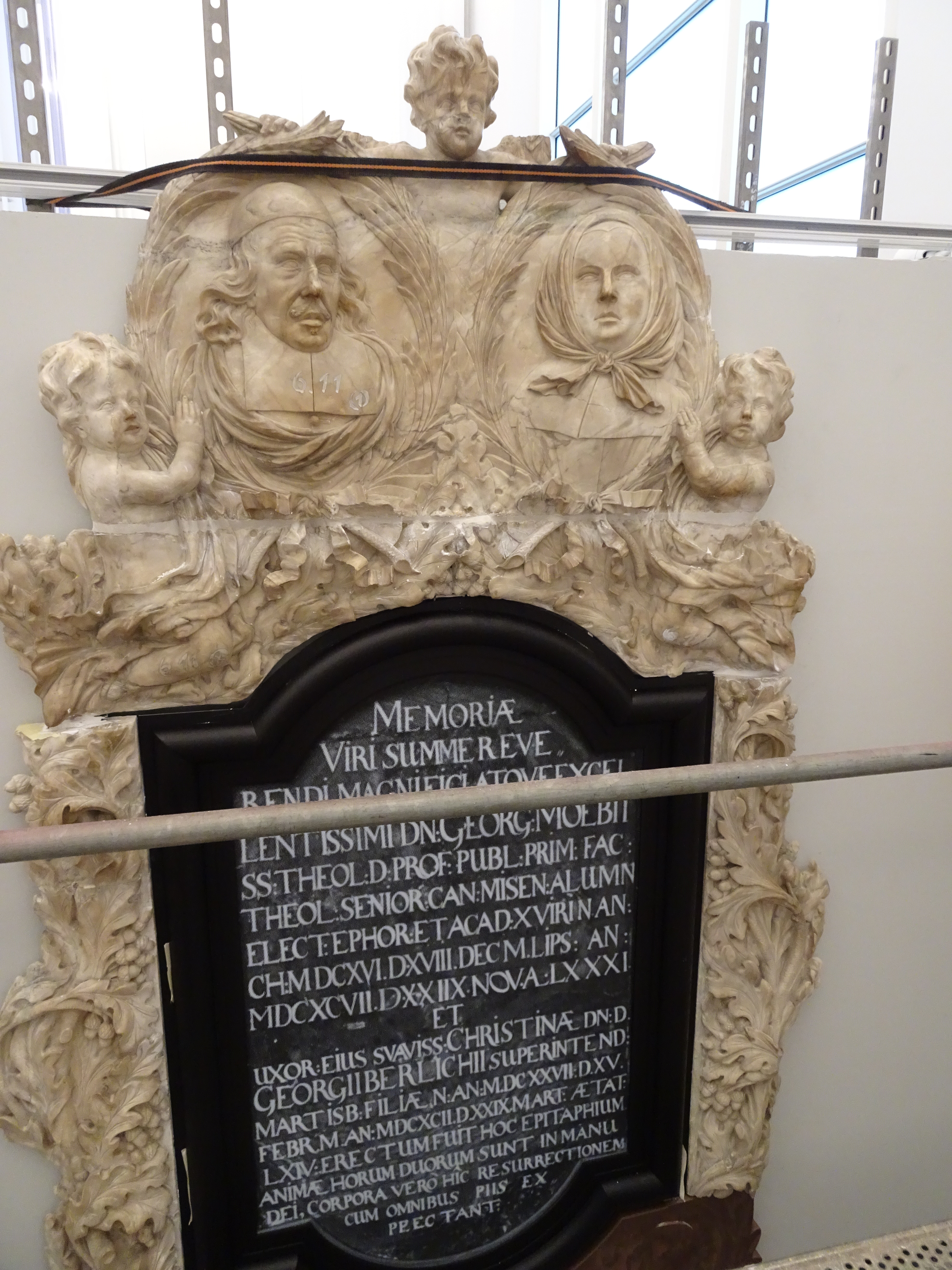 oberer teil des Möbius-Epitaphs in der Universitätskirche Leipzig während der Neumontage am 28.08.2015